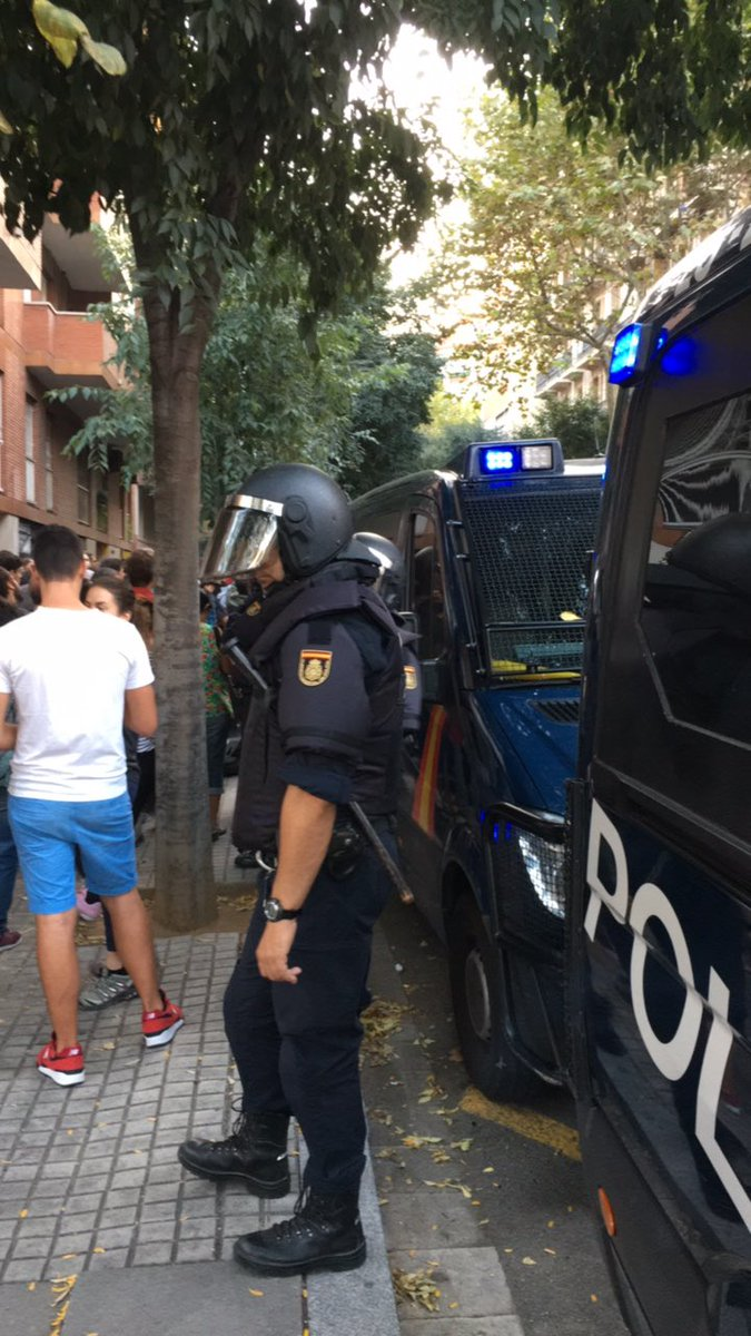 Agents de la Policia Nacional a la seu de la CUP a Barcelona.